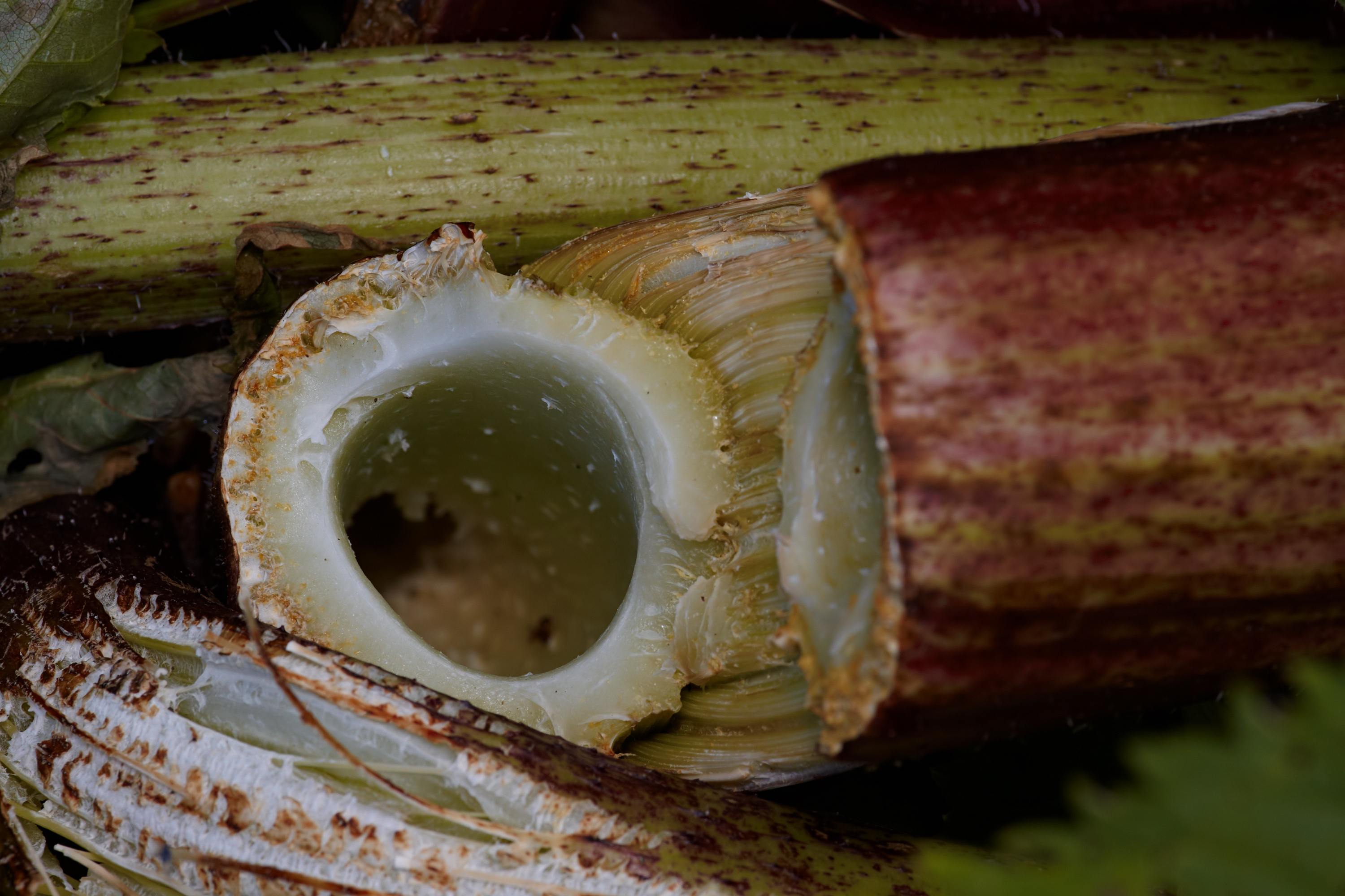 Broken stem of Heracleum mantegazzianum